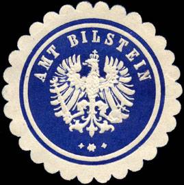 Sealing stamp Title: Amt Bilstein Description: dunkelblau, weiß, geprägt Place: Bilstein size: 4 cm